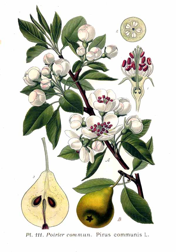 Pyrus communis L.